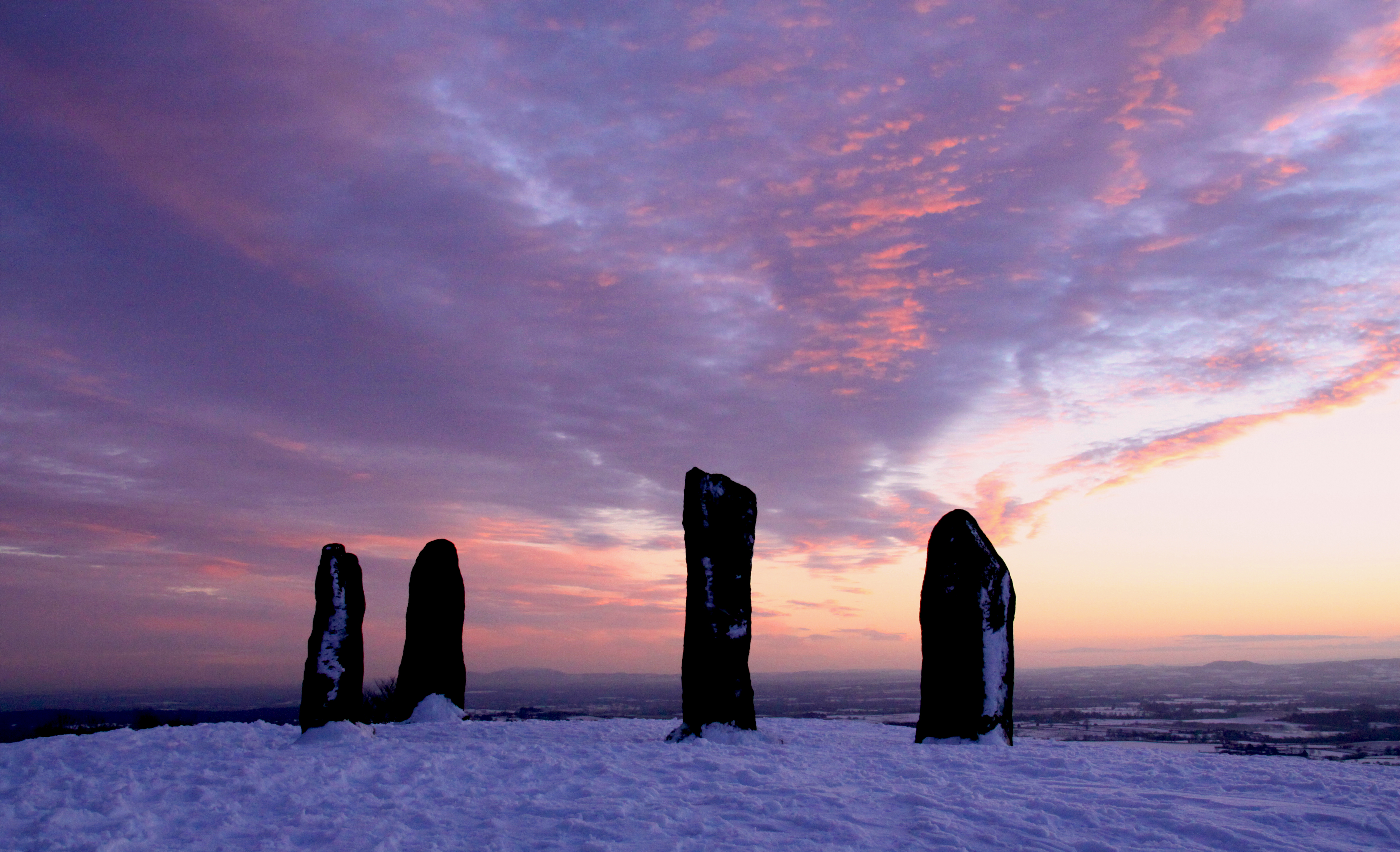 Clent standing stones, Winter sunset.